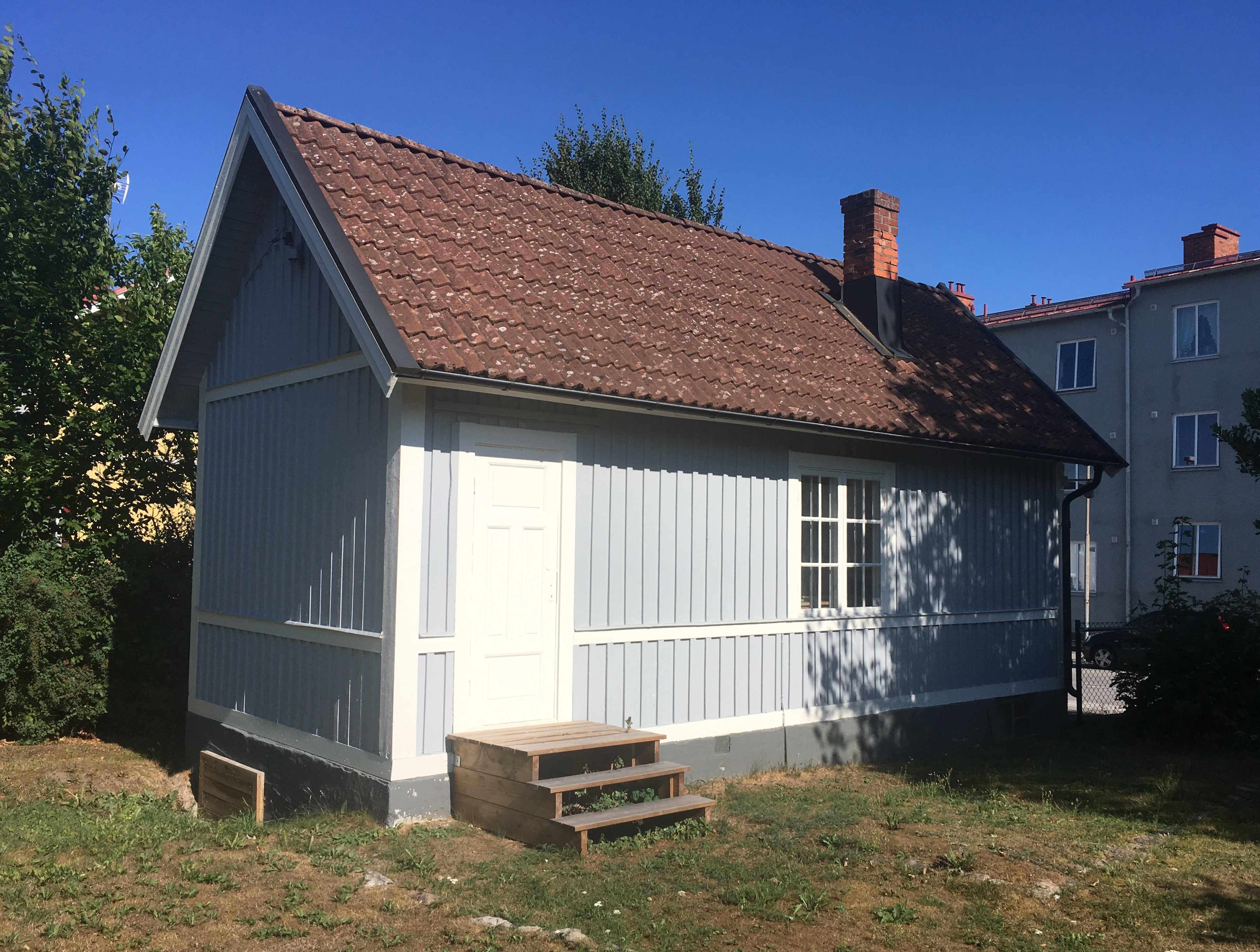 Ekholms fotoateljé i Kallinge, Ronneby kommun. Ateljén är byggnadsminne sedan 4 november 2015. Den är belägen på Norra Smålandsgatan 6 i Kallinge och är en av Sveriges minsta och äldsta dagsljusateljéer för fotografering.